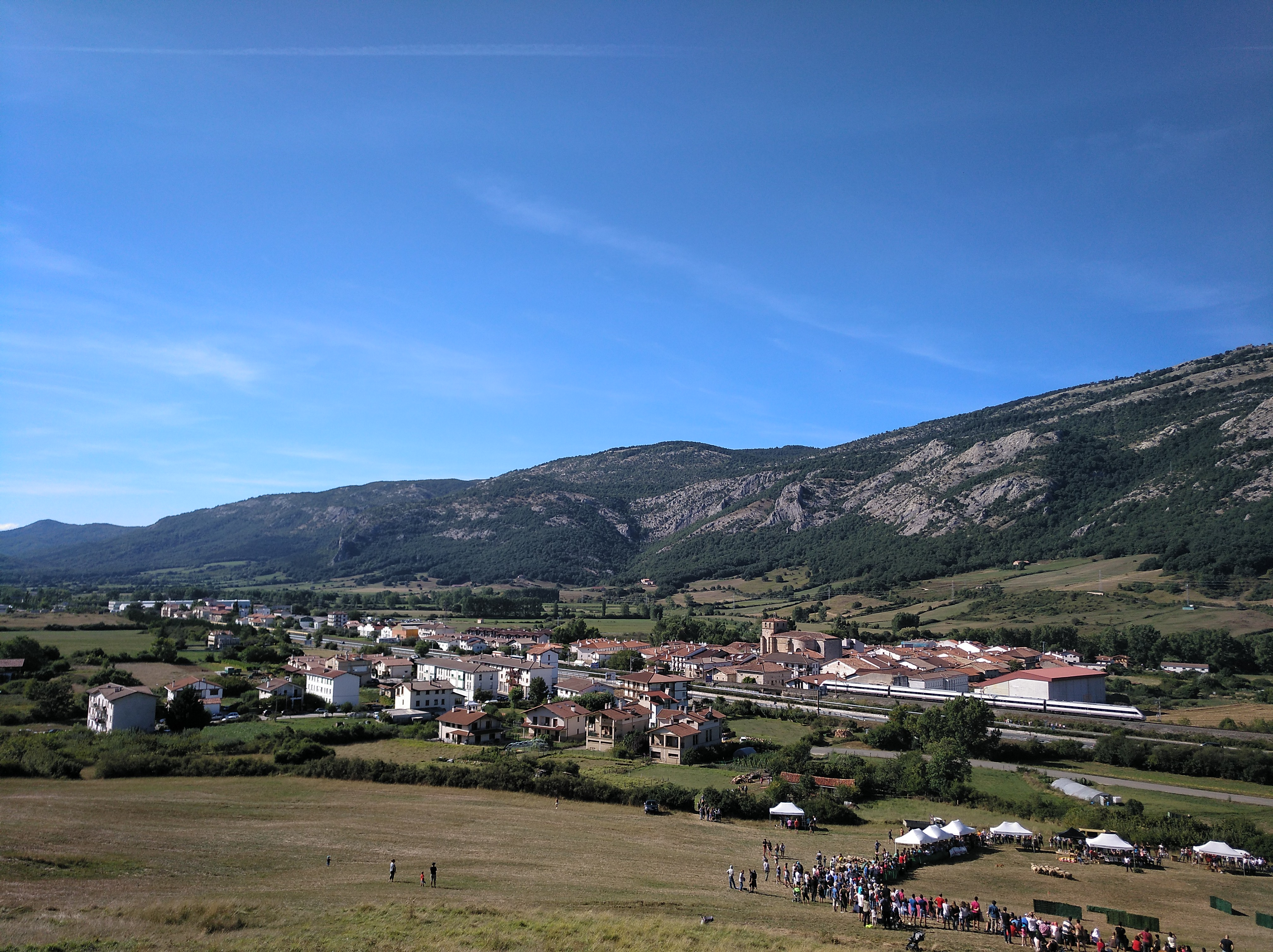 Uharte Arakil herria, Sakana, Nafarroa